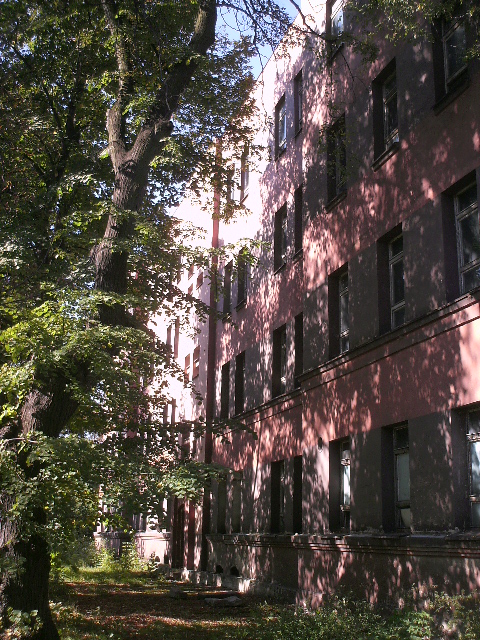 Gliwice, dawne koszary WOP - budynek od ul Daszyńskiego przed wyburzeniem